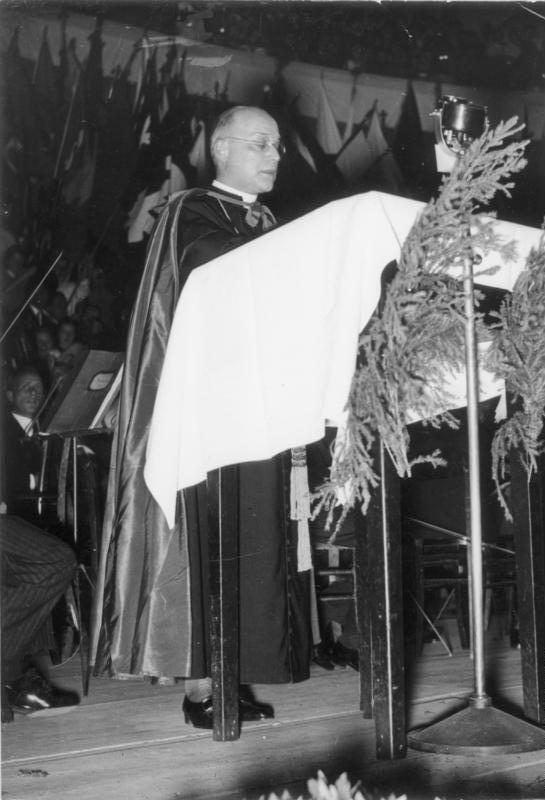 Begrüßungsfeier anläßlich der Inthronisation Sr. Exzellenz des Bischofs von Berlin Dr. Konrad Graf von Preysing. - e.G. 4883. Am 8. September 1935 fand im Berliner Sportpalast die Begrüßungsfeier anläßlich der Inthronisation Sr. Exzellenz des Bischofs von Berlin, Dr. Konrad Graf von Preysing, statt. Unser Bild zeigt Dr. Konrad Graf von Preysing, den neuen Bischof von Berlin bei seiner Ansprache.